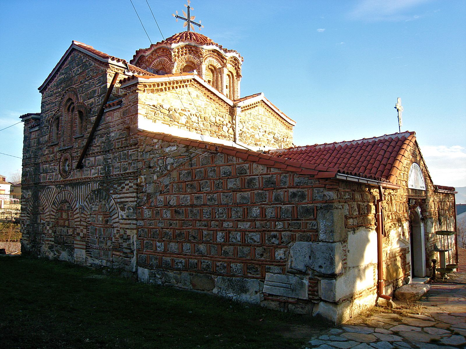 Црква Св. Димитрија, Варош, Прилеп